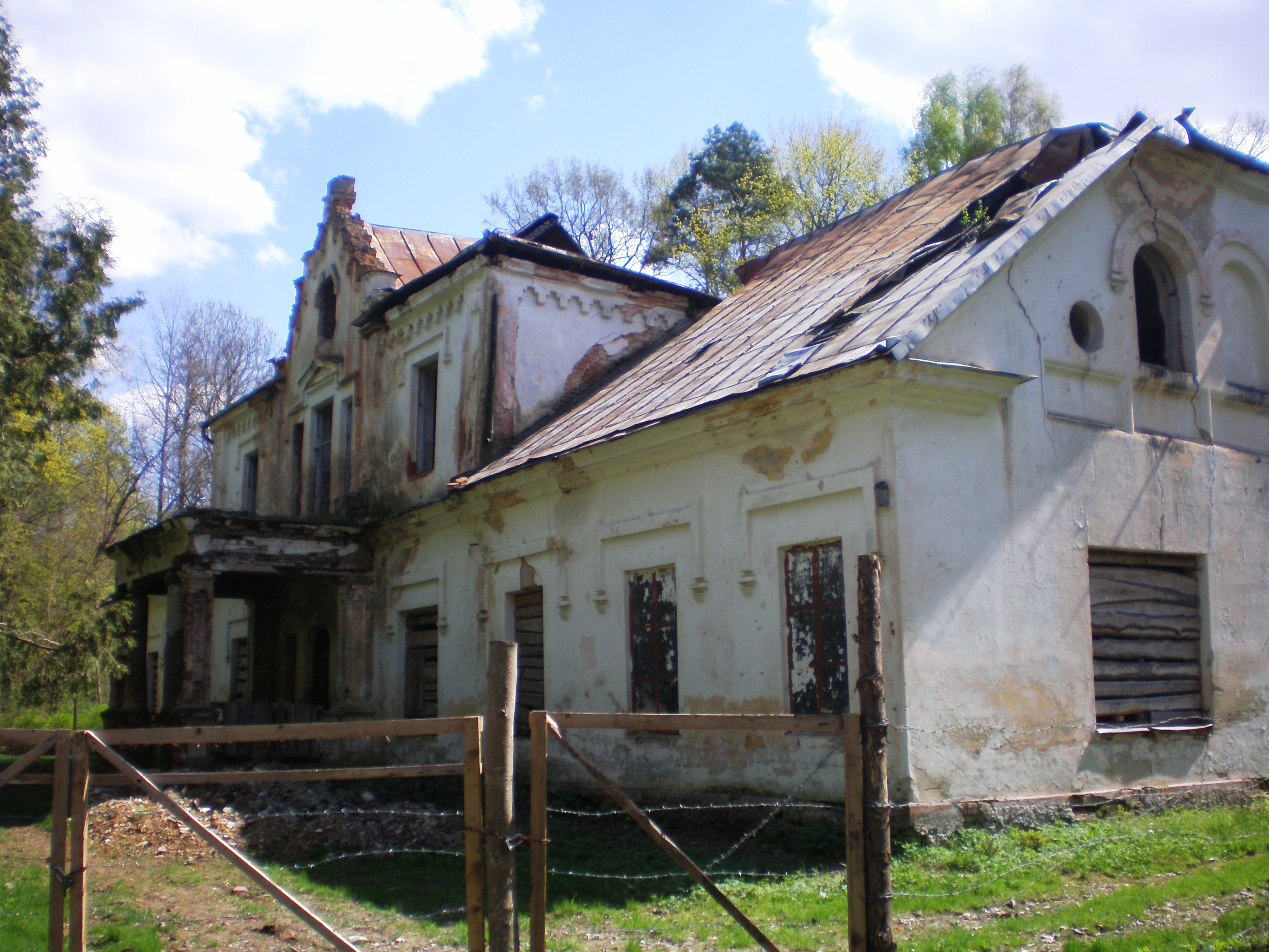 Kalnaberžės dvaro griuvėsiai, Kėdainių raj.